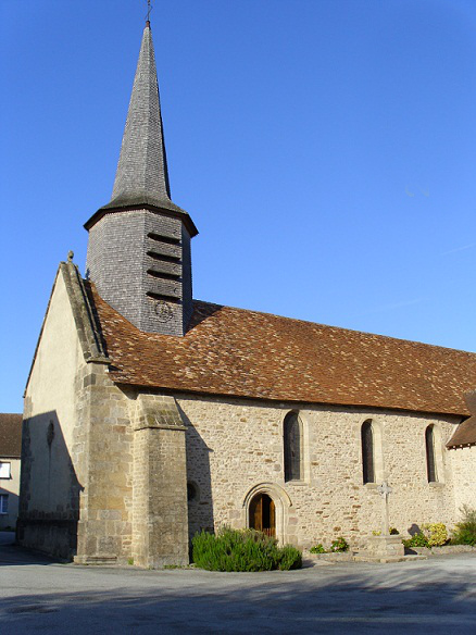 Eglise dans Dompierre les Eglises .